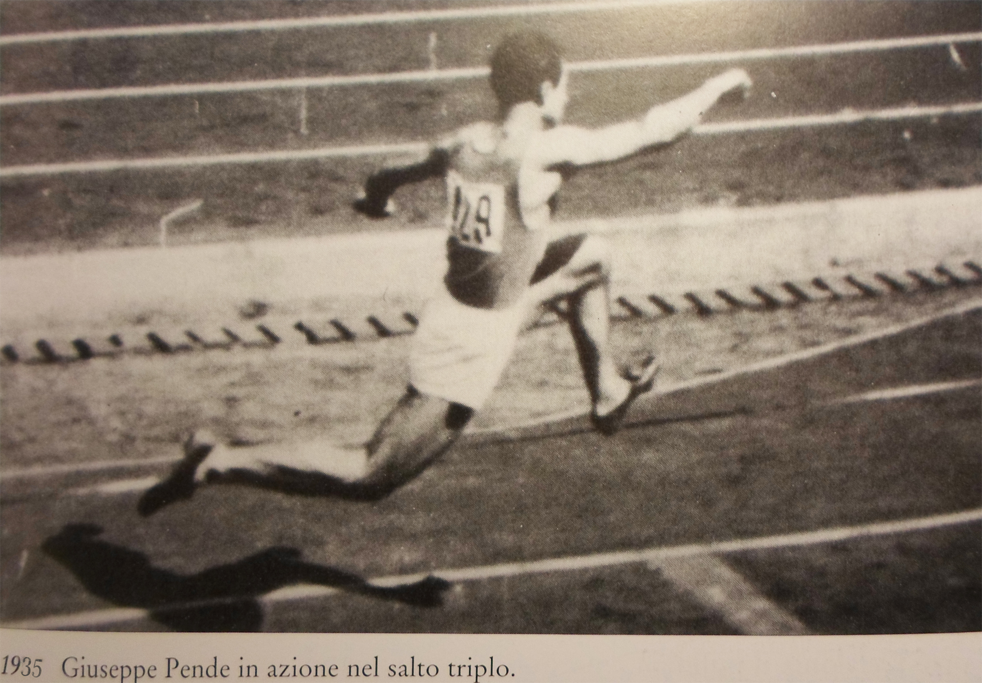 Oro ai campionati italiani assoluti di atletica leggera, salto triplo 1935 - 14,48 m